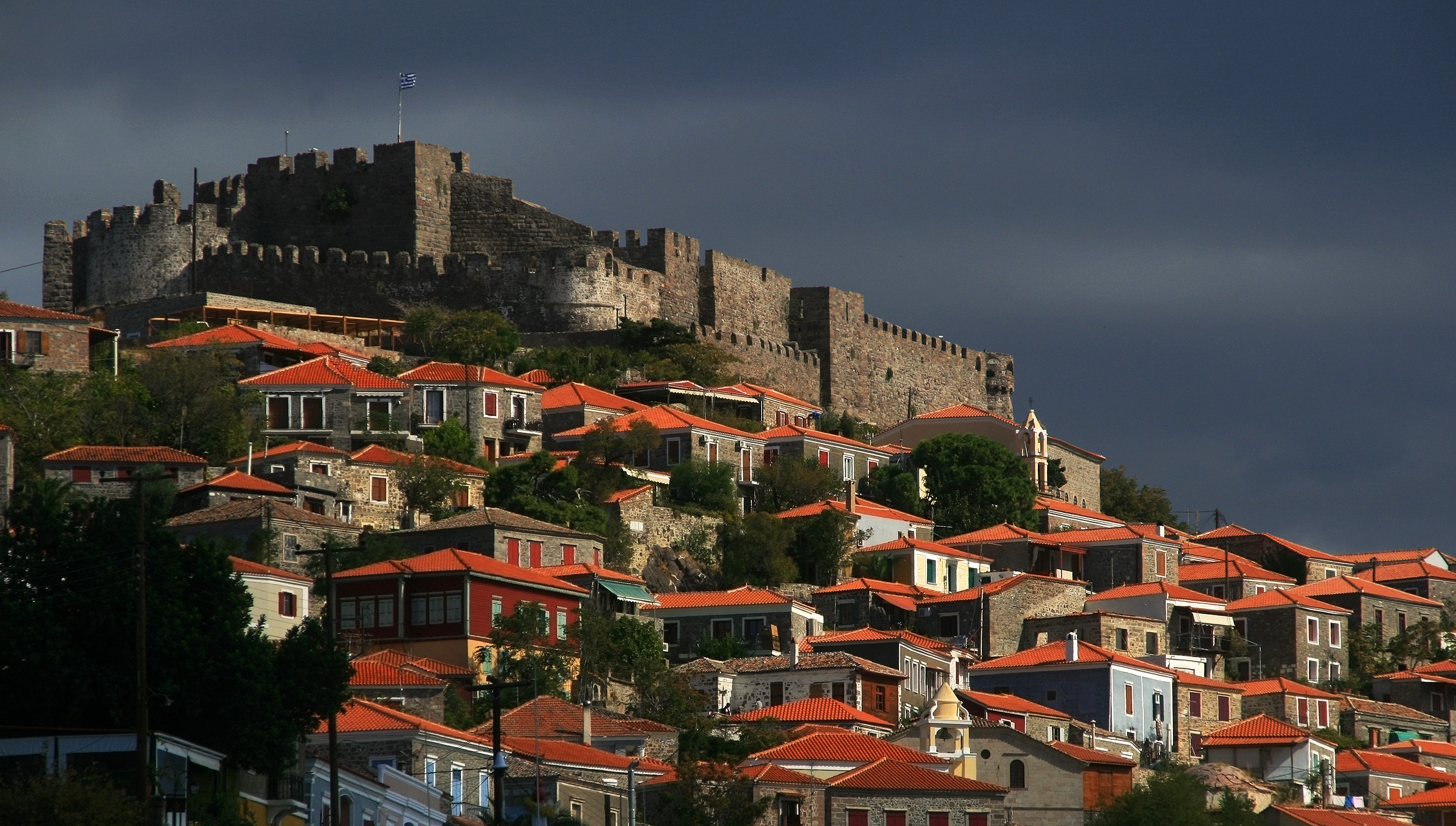 Κάστρο Μήθυμνας«Κάστρο Μήθυμνας»